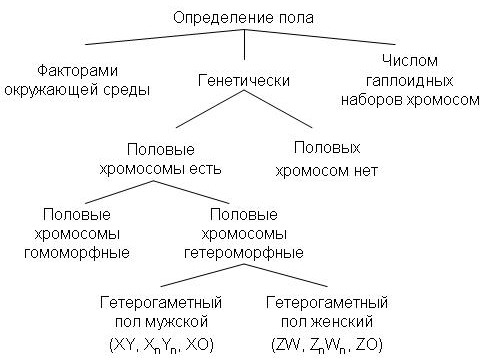 Варианты механизмов определения пола (Коряков, Жимулёв, 2009)